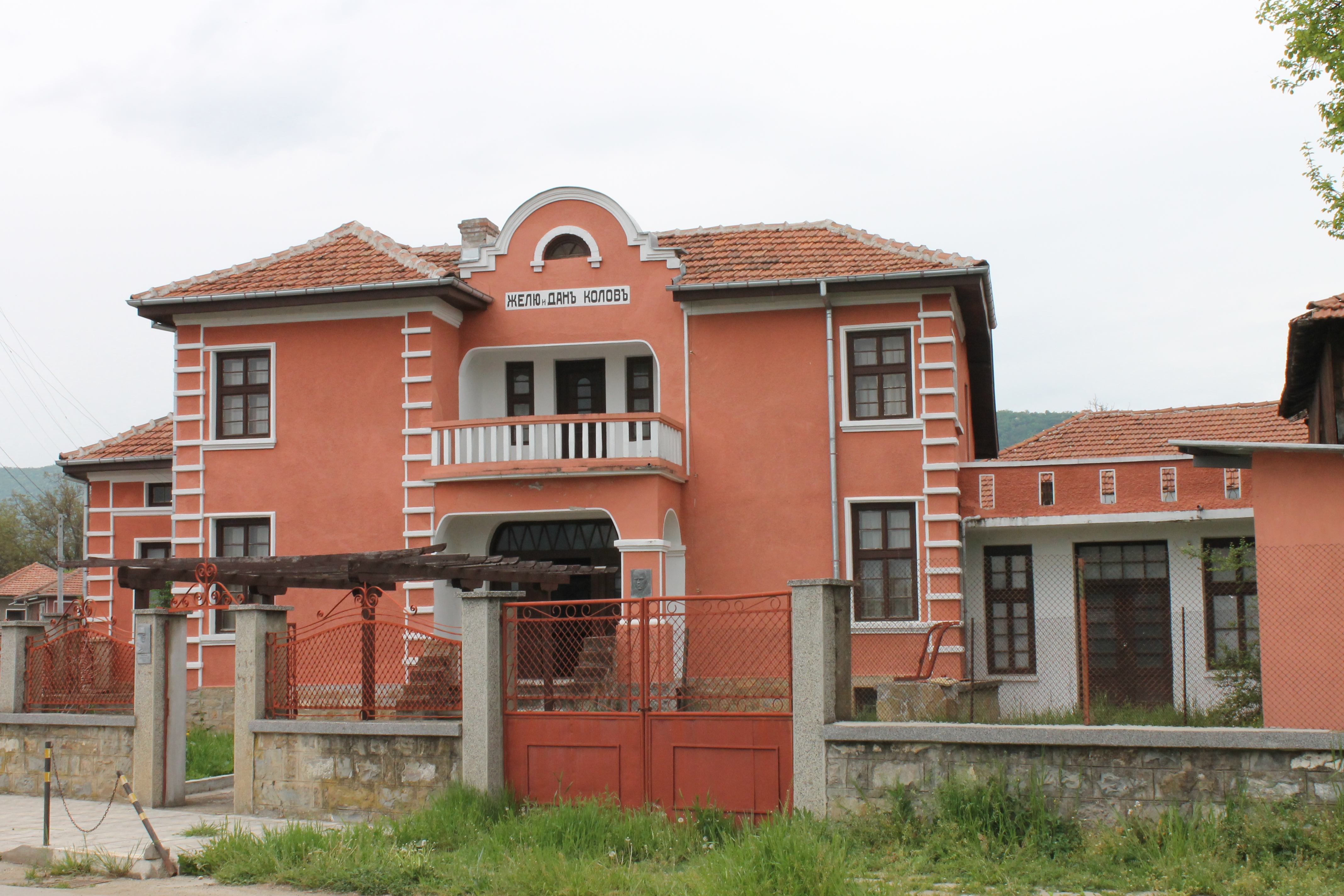 Къща музей на Дан Колов в село Сенник